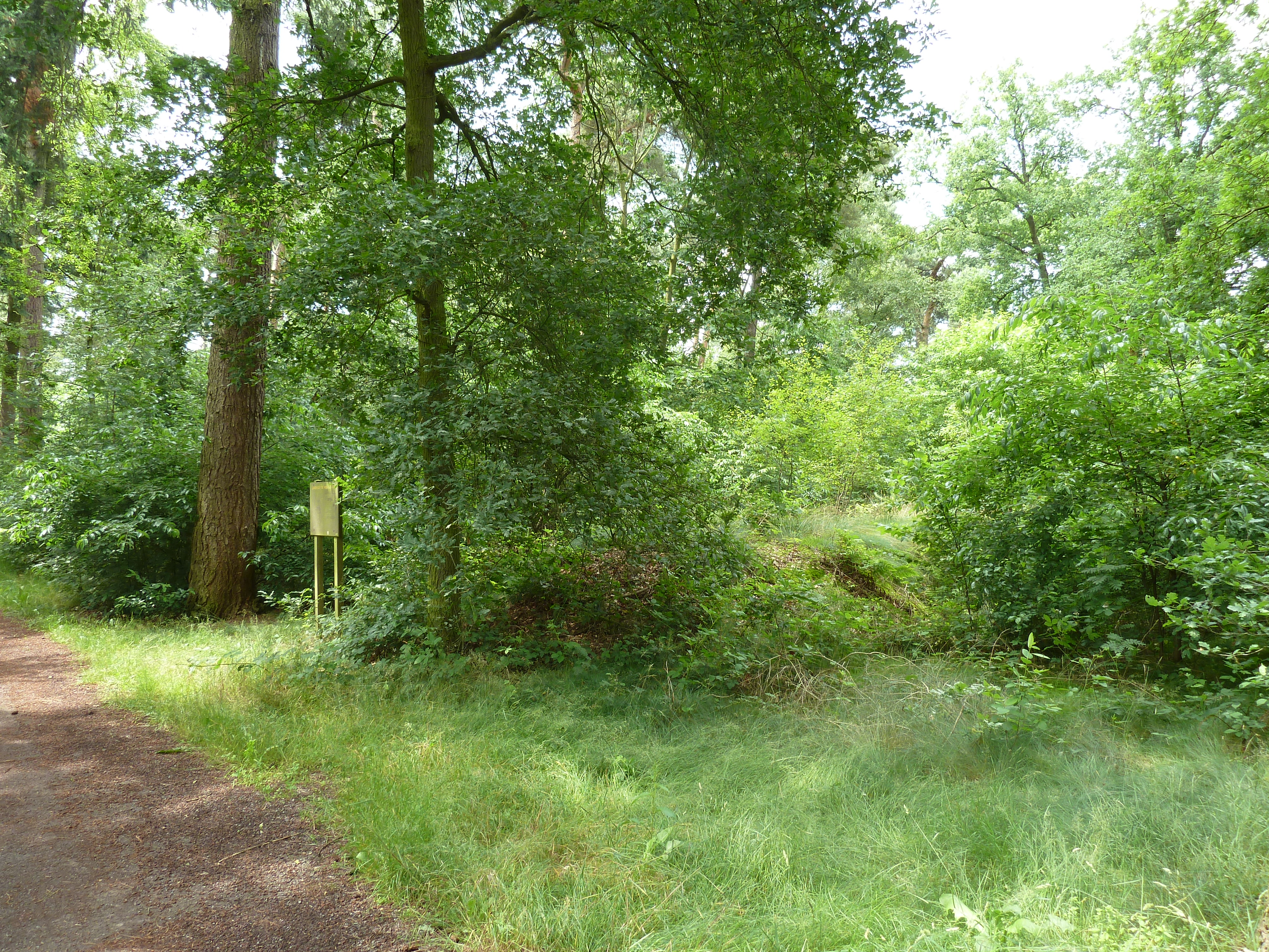 Landweer De Wolfsgraaf te Groenewoud, Swalmen, Limburg, Nederland